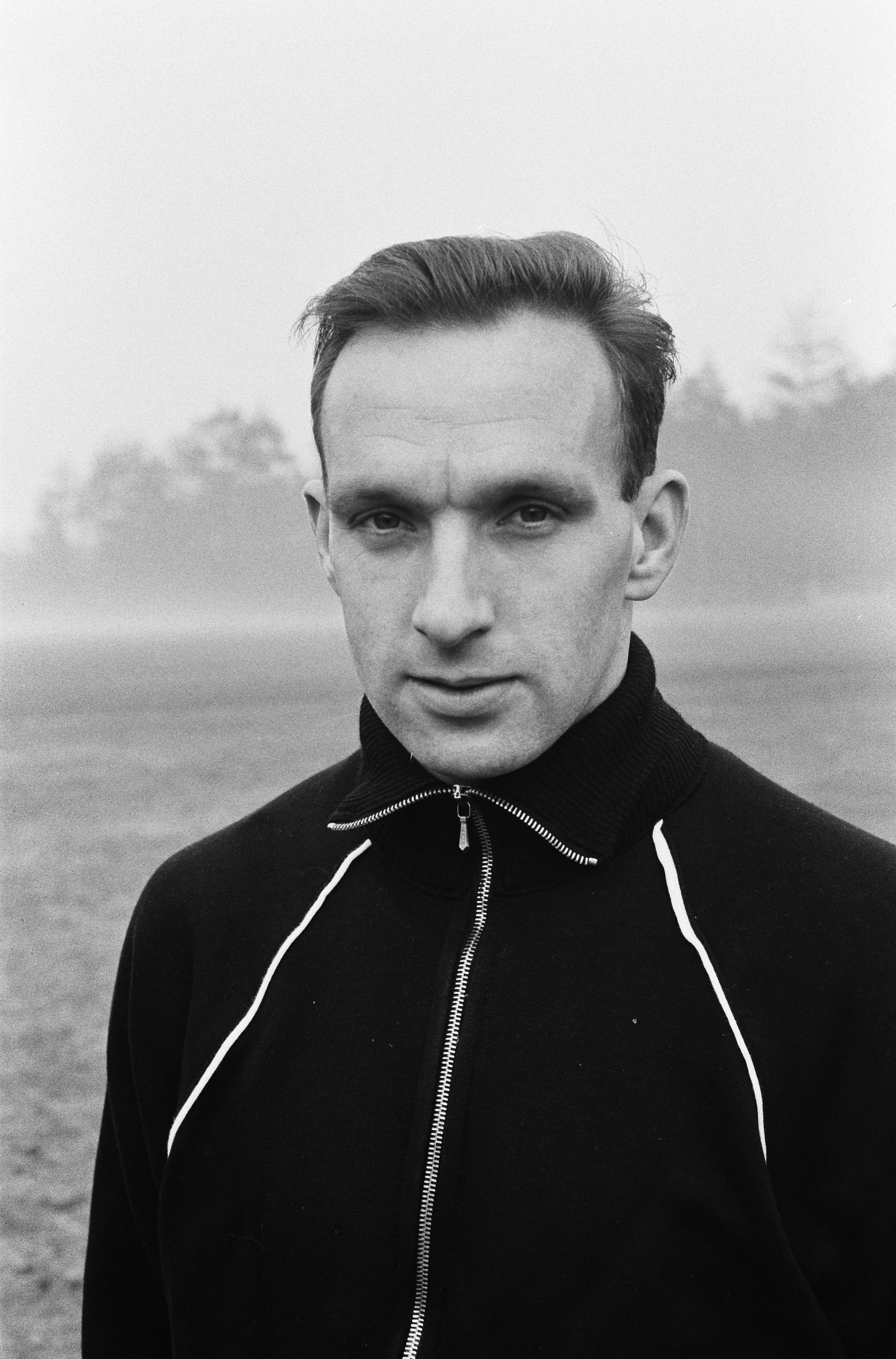 Collectie / Archief : Fotocollectie Anefo Reportage / Serie : [ onbekend ] Beschrijving : Training Nederlands elftal te Zeist, nr. 1, 2 Bennaerts (kop) (Feijenoord) Datum : 27 maart 1963 Locatie : Utrecht, Zeist Trefwoorden : sport, voetbal Instellingsnaam : Feyenoord Fotograaf : Pot, Harry / Anefo Auteursrechthebbende : Nationaal Archief Materiaalsoort : Negatief (zwart/wit) Nummer archiefinventaris : bekijk toegang 2.24.01.05 Bestanddeelnummer : 914-9736 Reacties Geplaatst door Gertrud op 24 september 2014 - 17:14. Training Nederlands elftal te Zeist, nr. 1, 2 Rinus Bennaars (kop) (Feijenoord) Persoonsnamen: Bennaars, Rinus